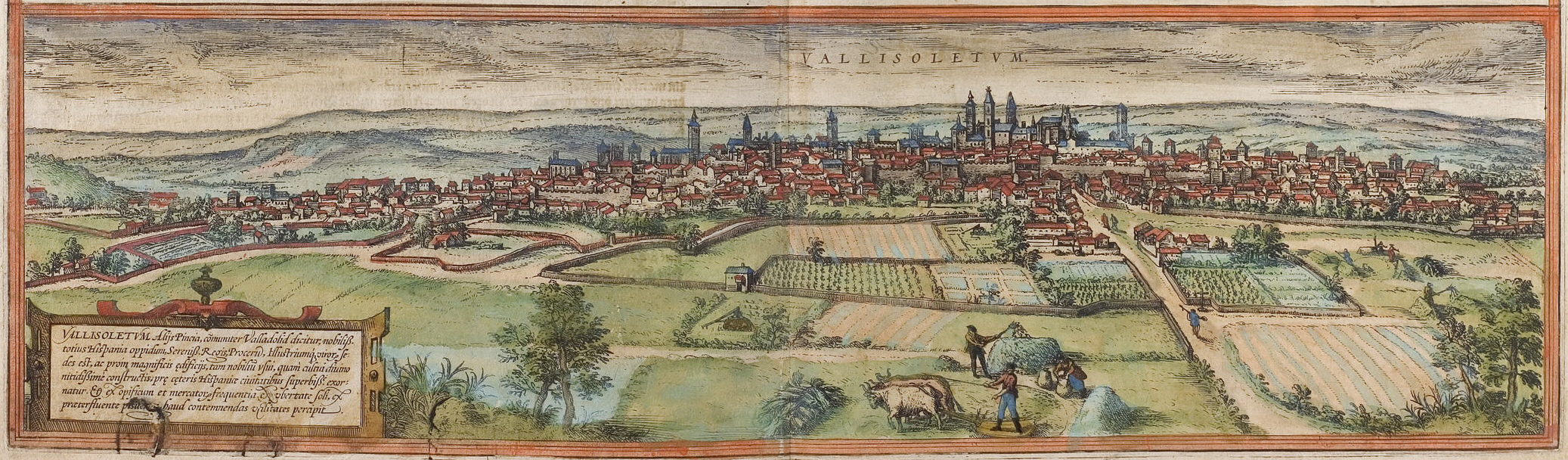 Valladolid